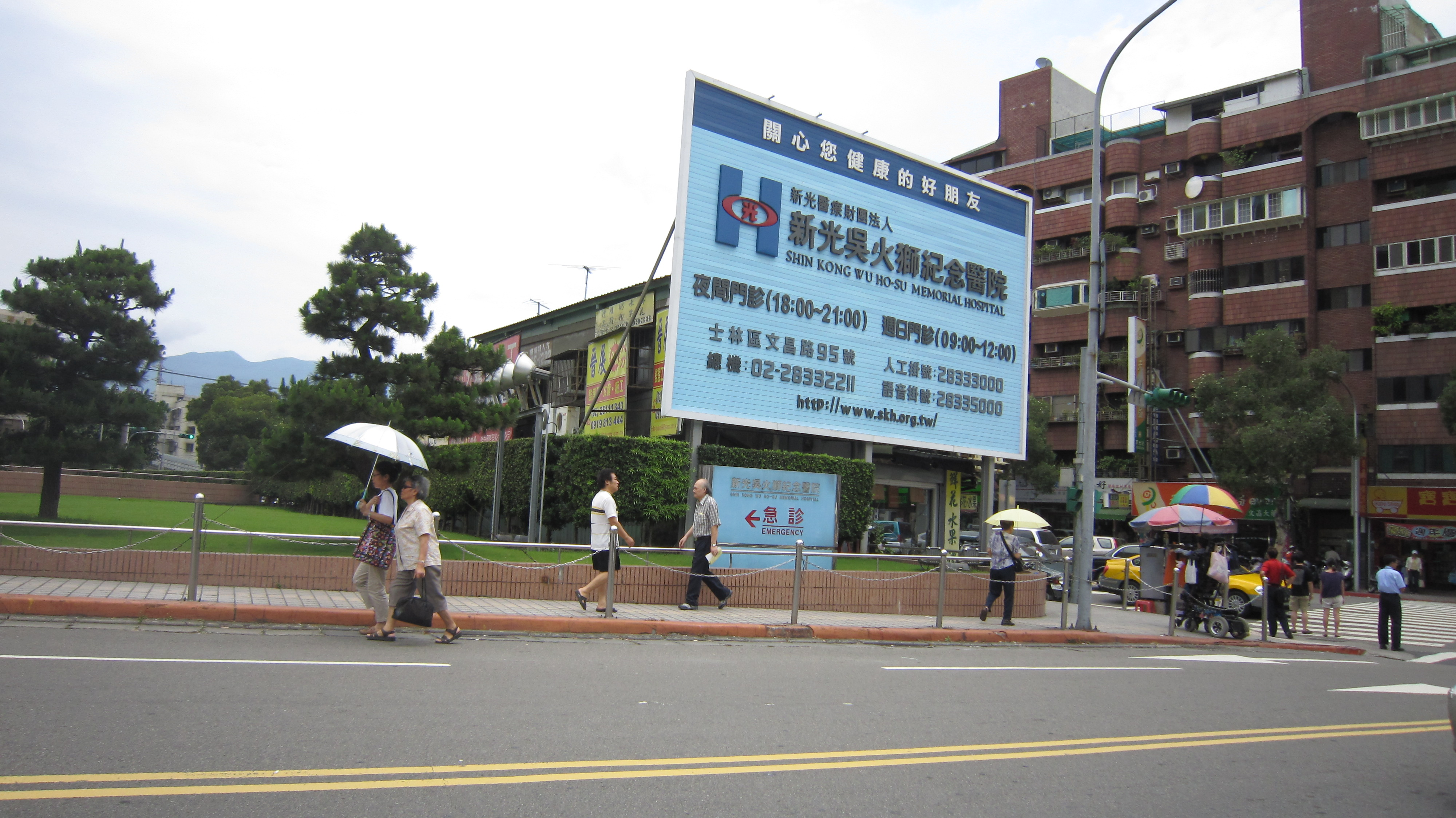 士林區新光醫院